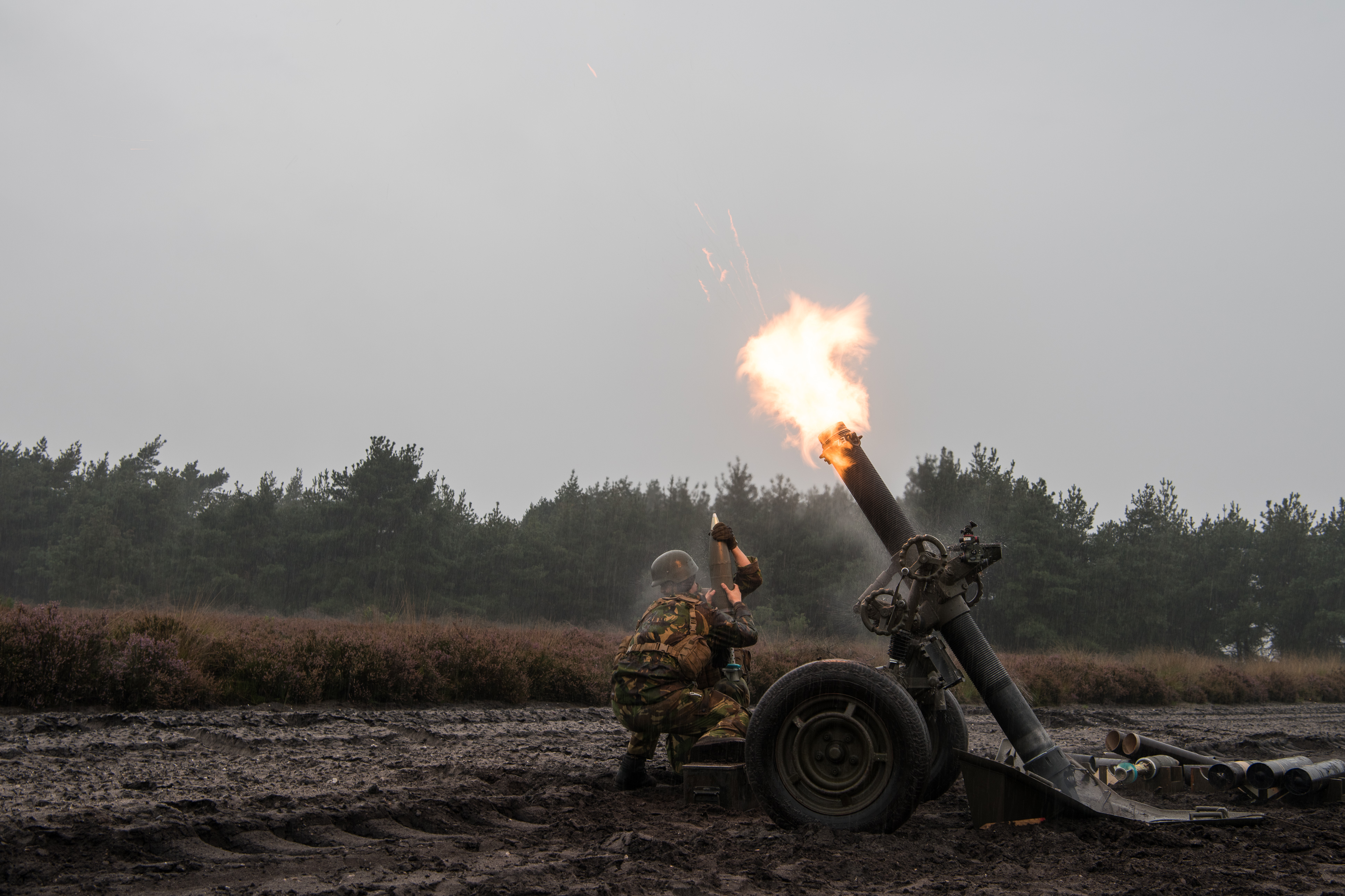 Artillerie traint met helikopters